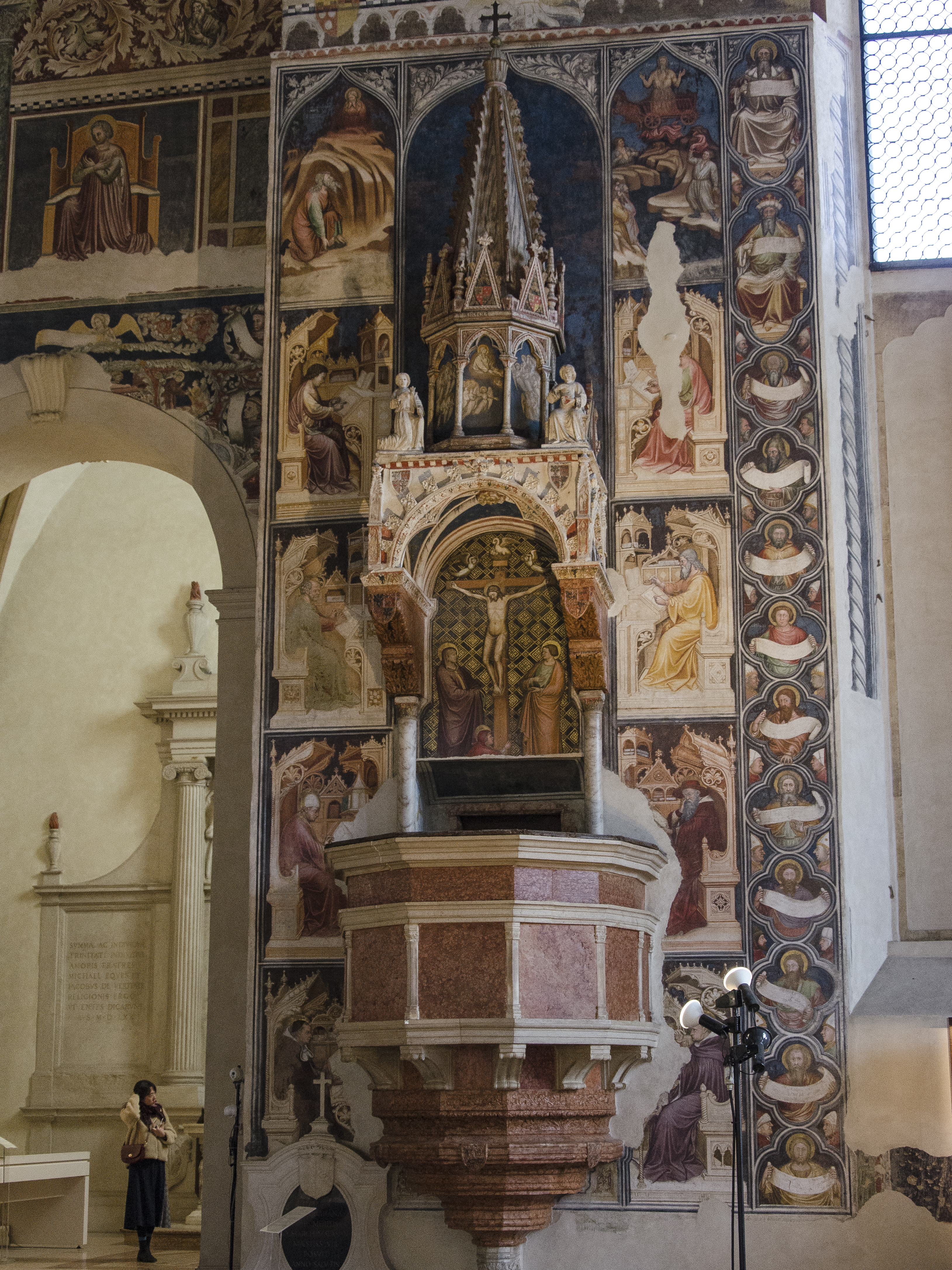 Fotografia della chiesa superiore